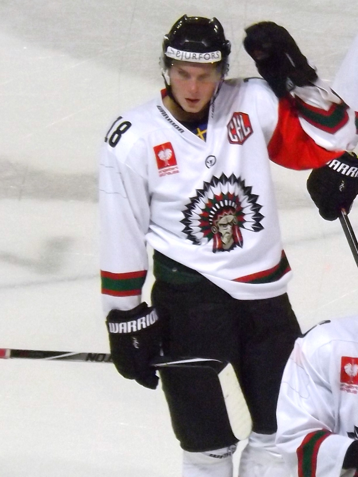 Joueur de hockey sur glace Frölunda Indians, CHL 2014